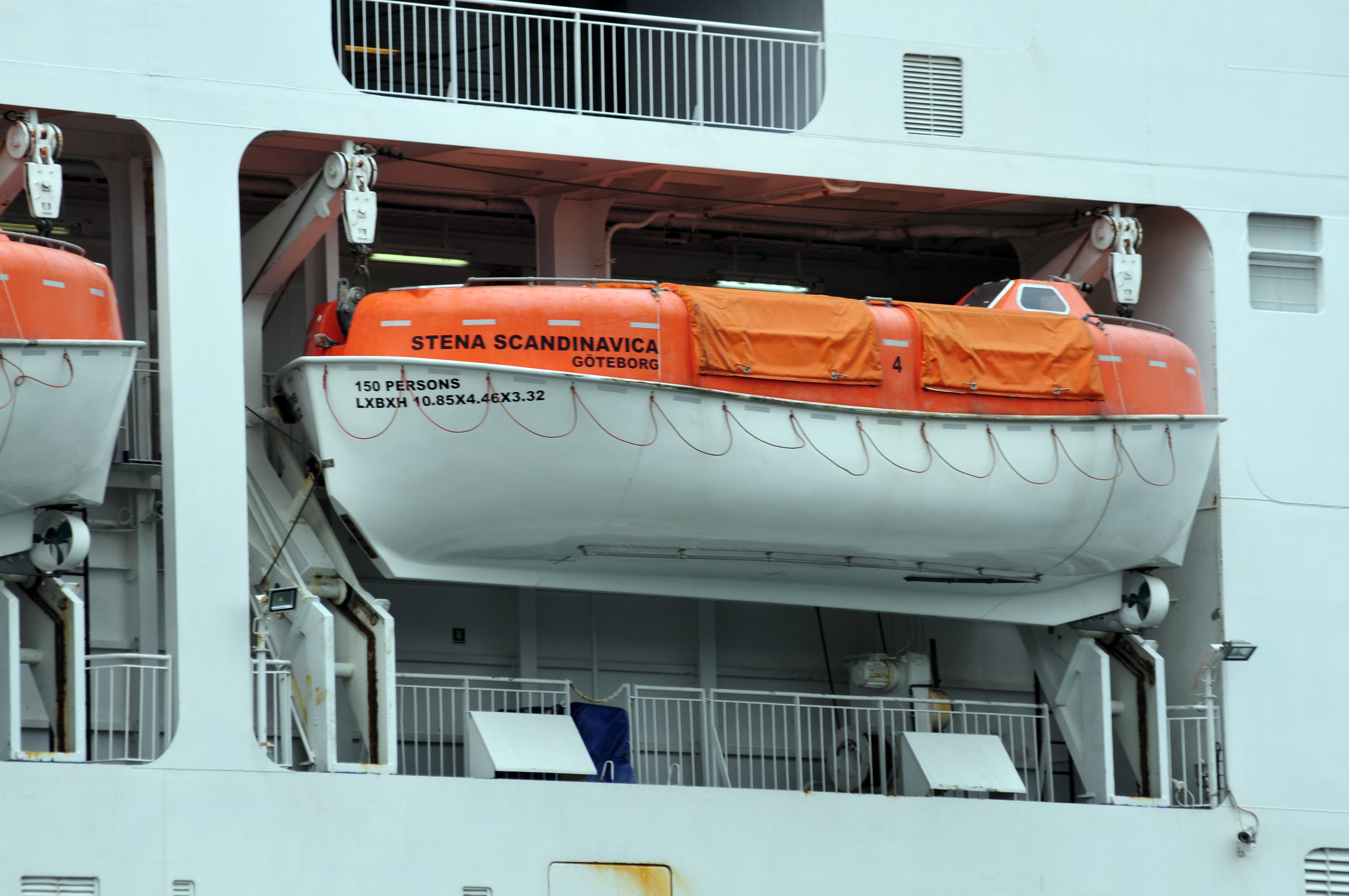 Kiel